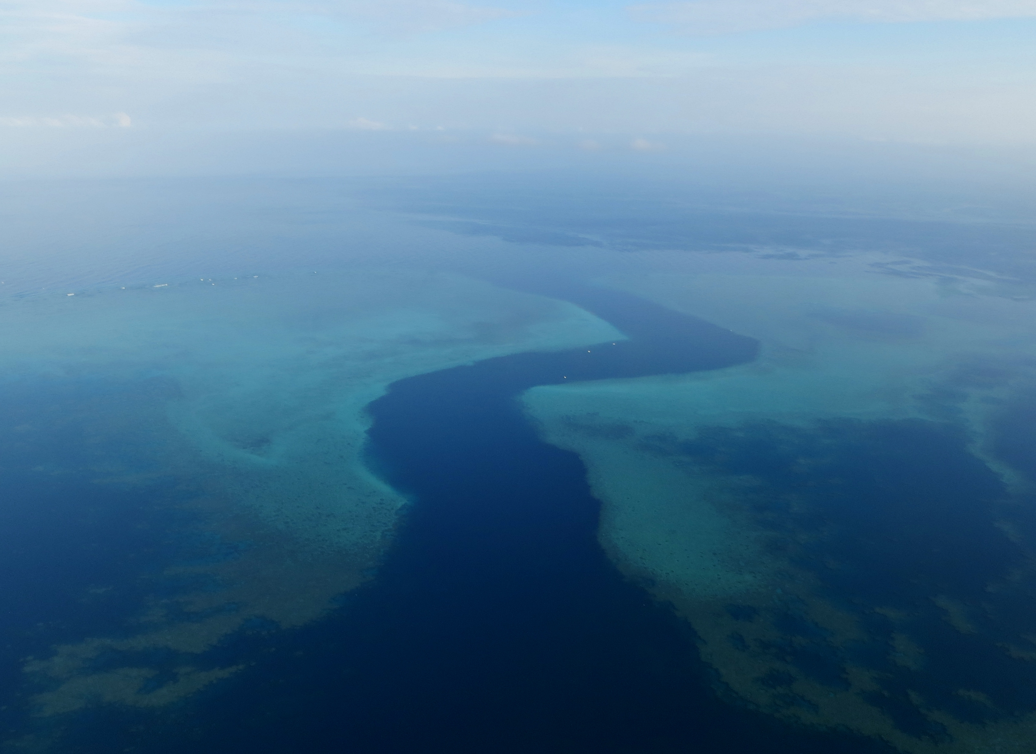 Vue aérienne de la Passe en S (Mayotte).